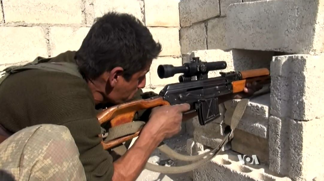 YPG pendant la bataille de Kobané, vers fin janvier 2015.